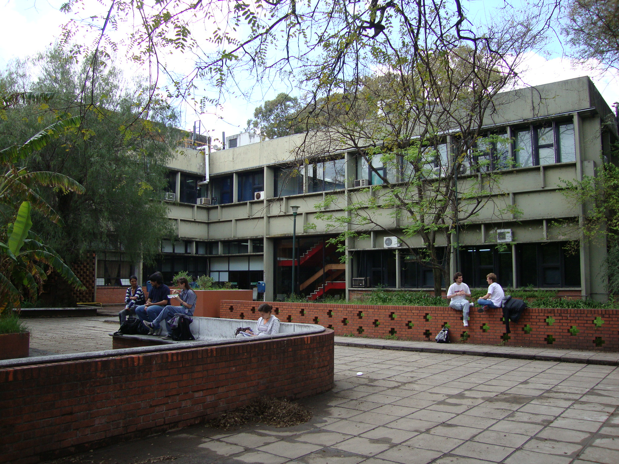 Plaza de acceso y entrada principal al Pabellón de Industrias de la Ciudad Universitaria de Buenos Aires. Allí se cursan carreras que dependen del Departamento de Industrias de la Facultad de Ciencias Exactas y Naturales de la Universidad de Buenos Aires, junto con la Facultad de Ingeniería. El edificio fue proyectado por un equipo de la Facultad de Arquitectura y Urbanismo, hacia 1958.